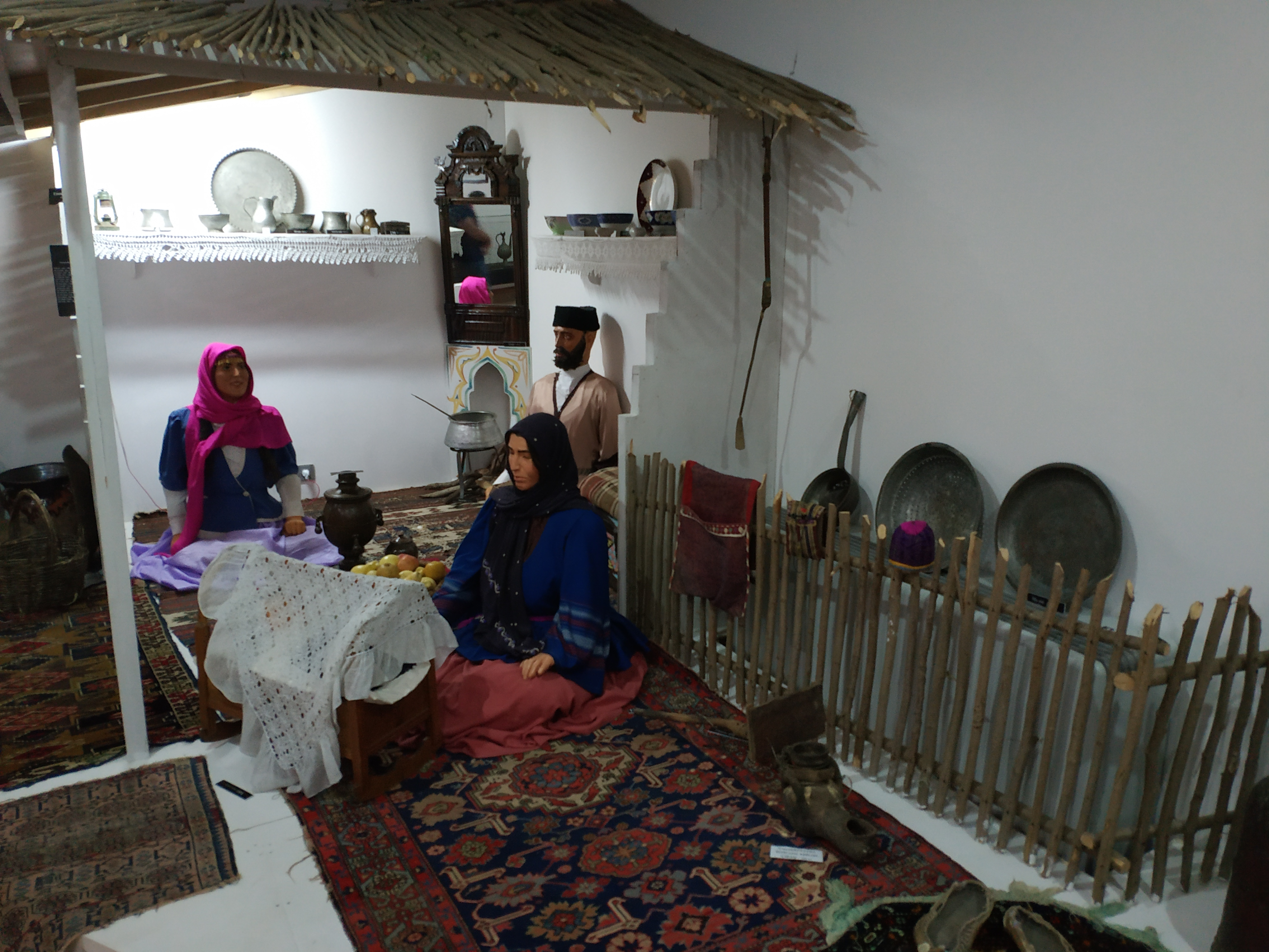 Quba Tarix - Diyarşünaslıq Muzeyi - kənd həyatı guşəsi